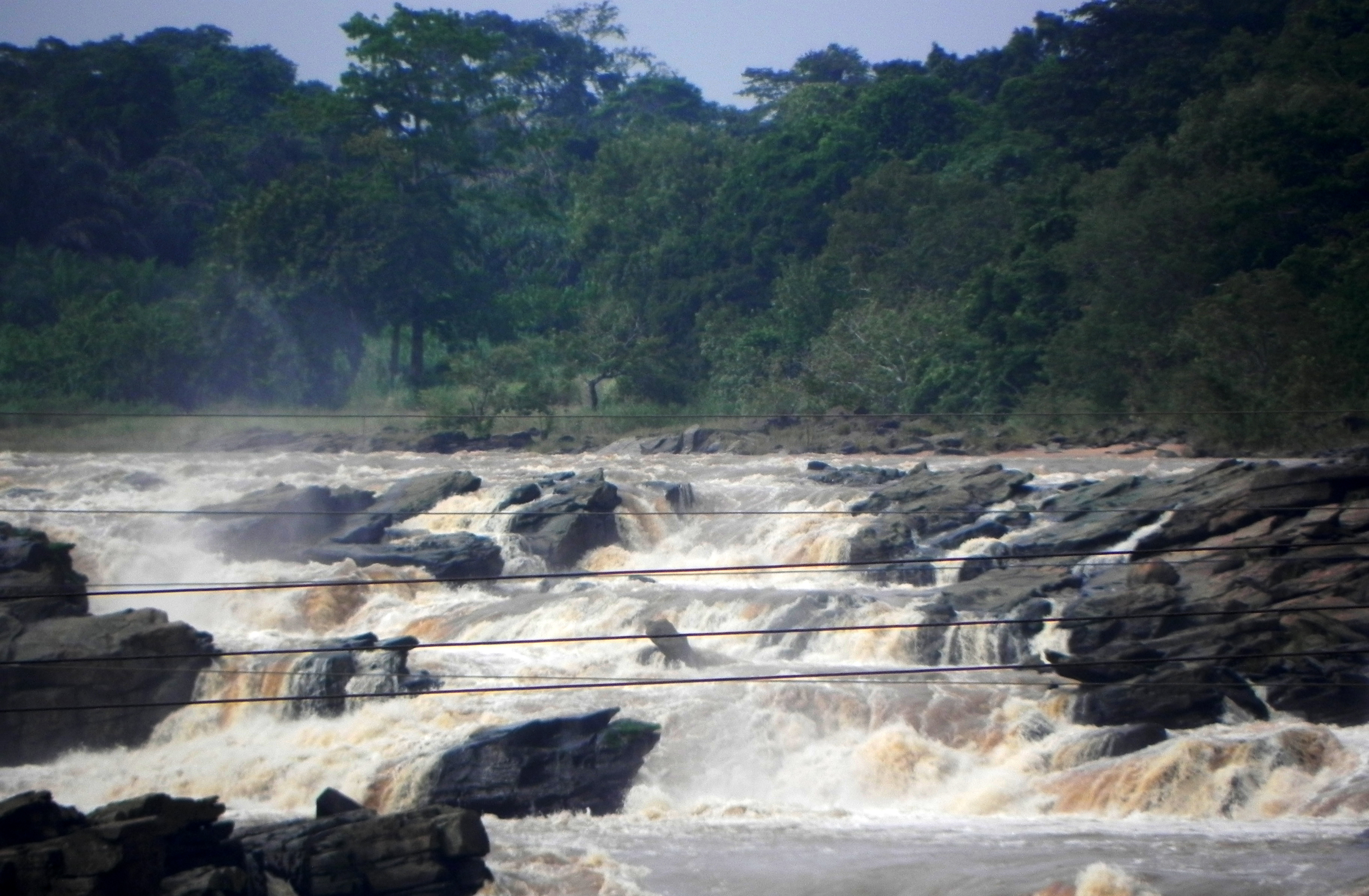 La rivière sanaga